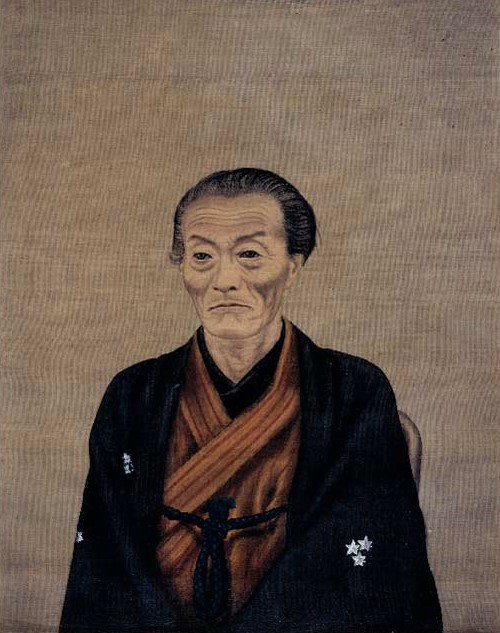 川本幸民の肖像画。